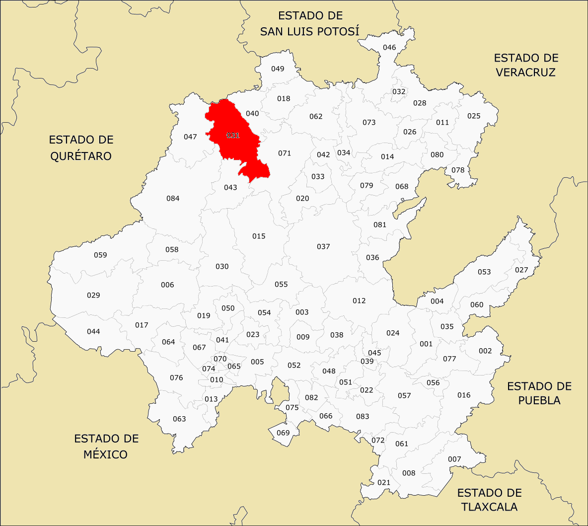 Municipios de Hidalgo